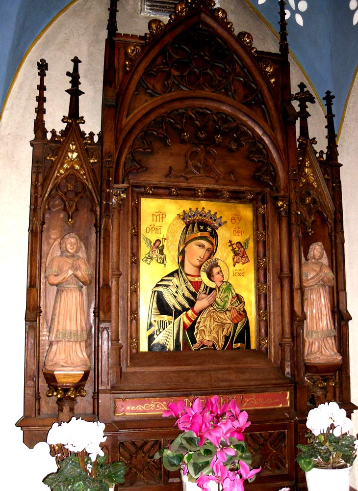 Bochum-Altenbochum. In der katholische Liebfrauen Kirche.